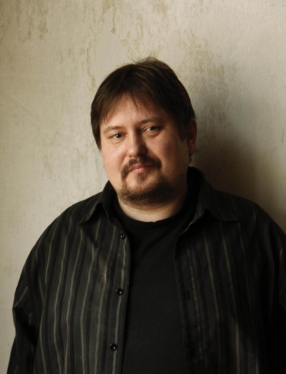 Libor Beránek portrét